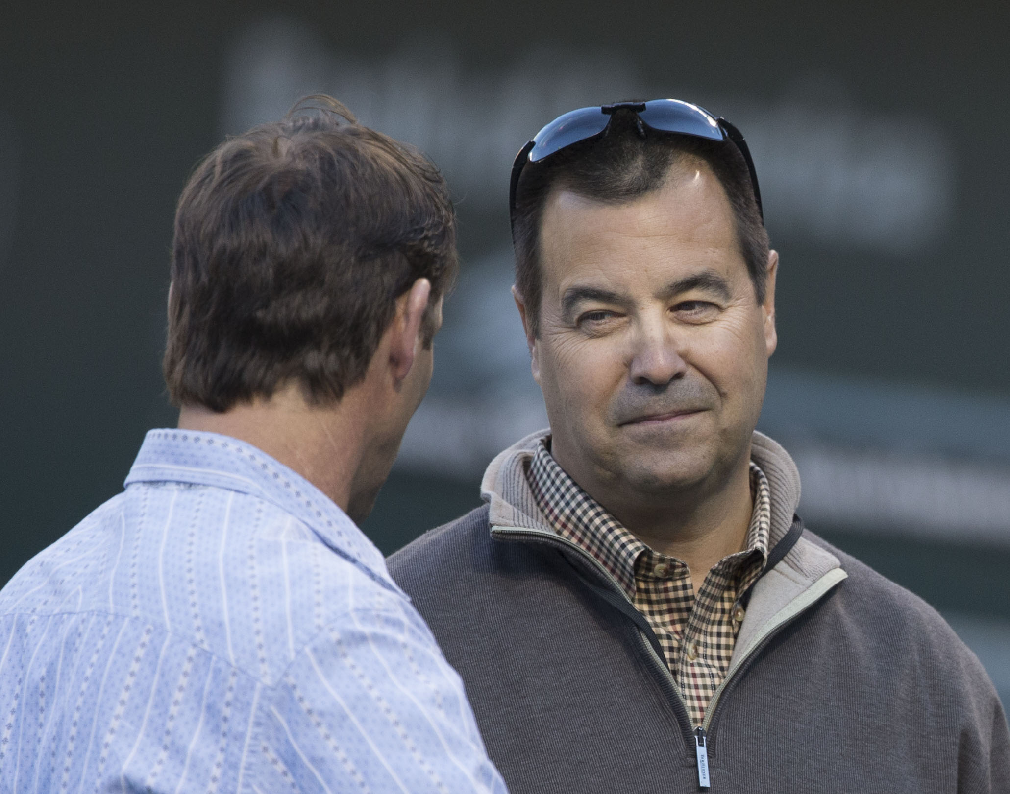 Blue Jays at Orioles 04/11/15